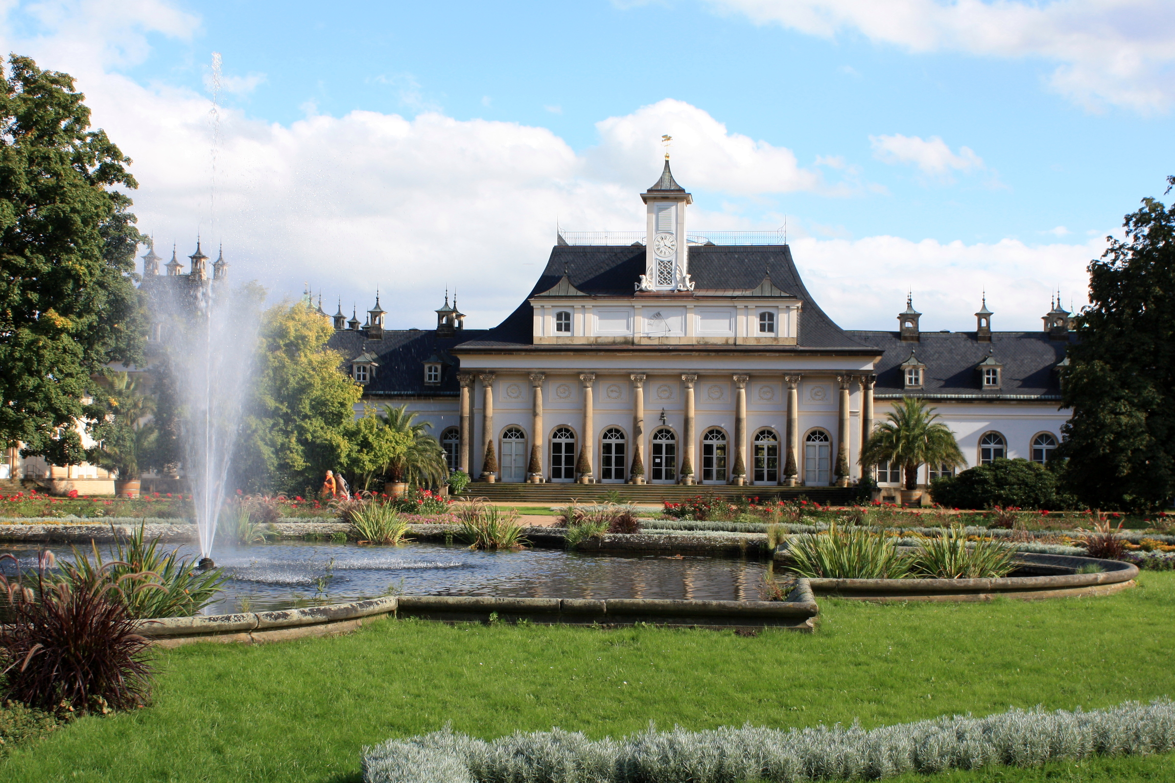 Schloss Pillnitz: Neues Palais mit barockem Lustgarten im September 2010